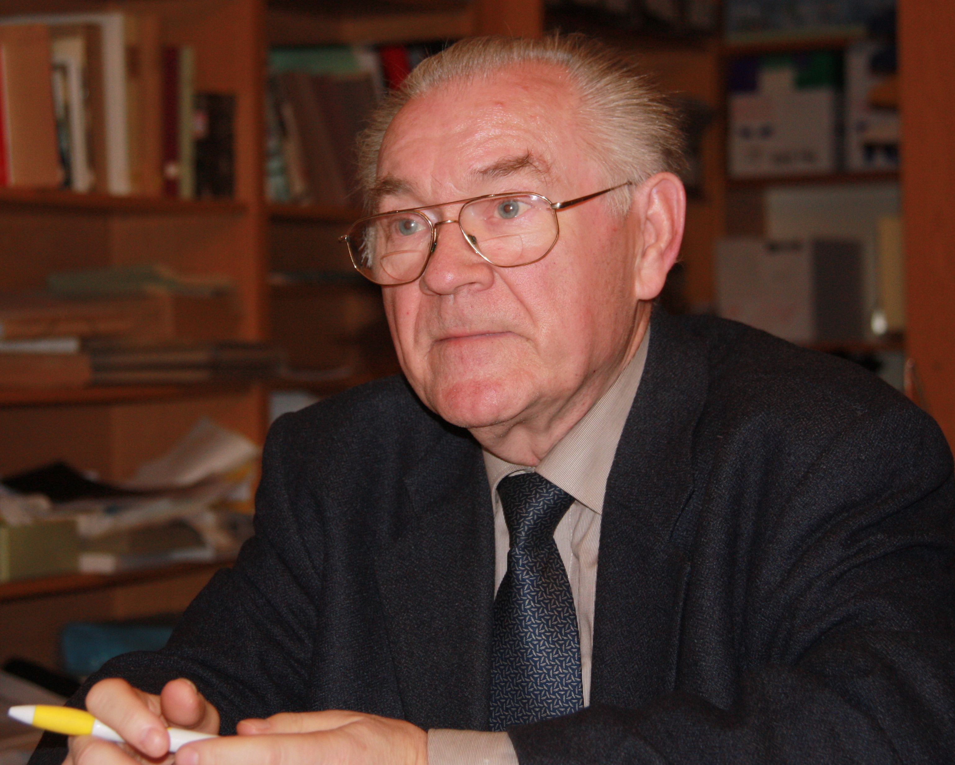 Prof. em. Winfried Schich während eines Colloquiums in der Landesgeschichtlichen Vereinigung Berlins.